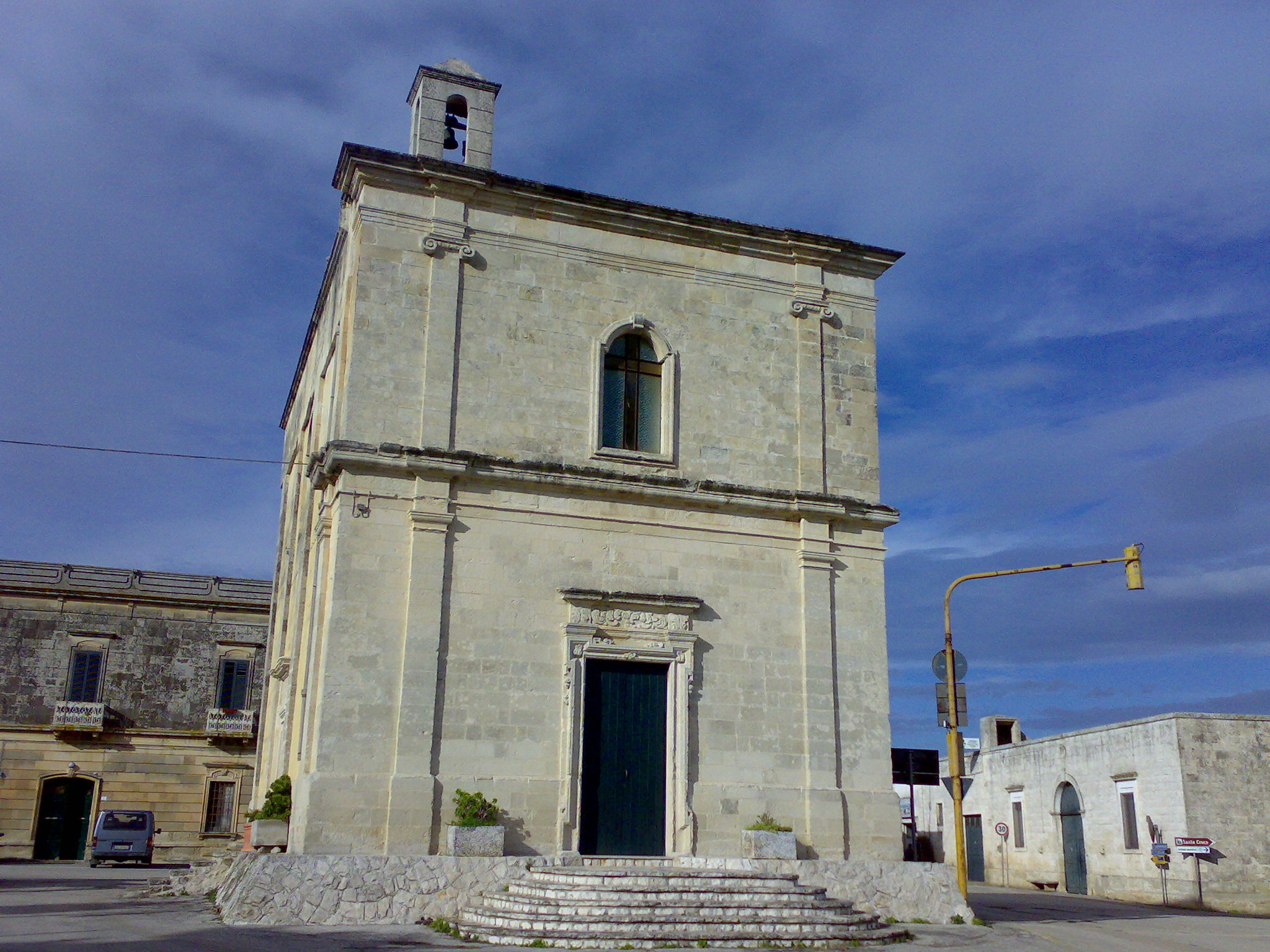 Minervino_di_Lecce_San Pietro, provincia di Lecce